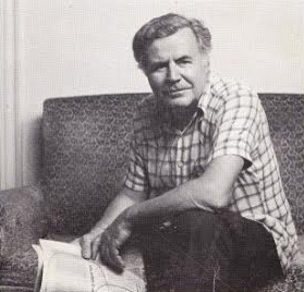 Pietro Sissa in prima di copertina di Sapore di Mele.